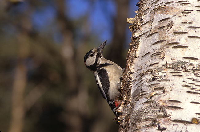 Dendrocopos major